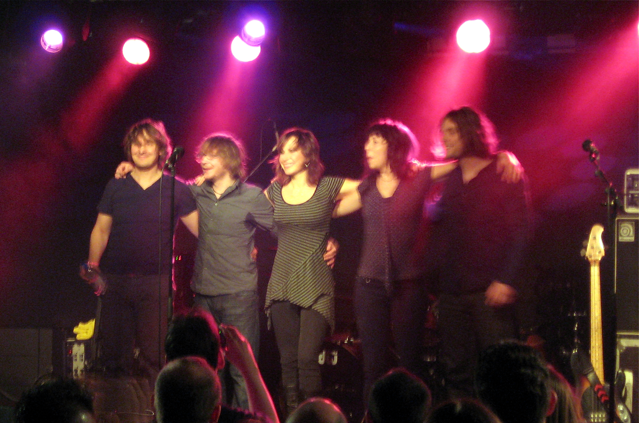 The Gathering live @ Colos-Saal, Aschaffenburg